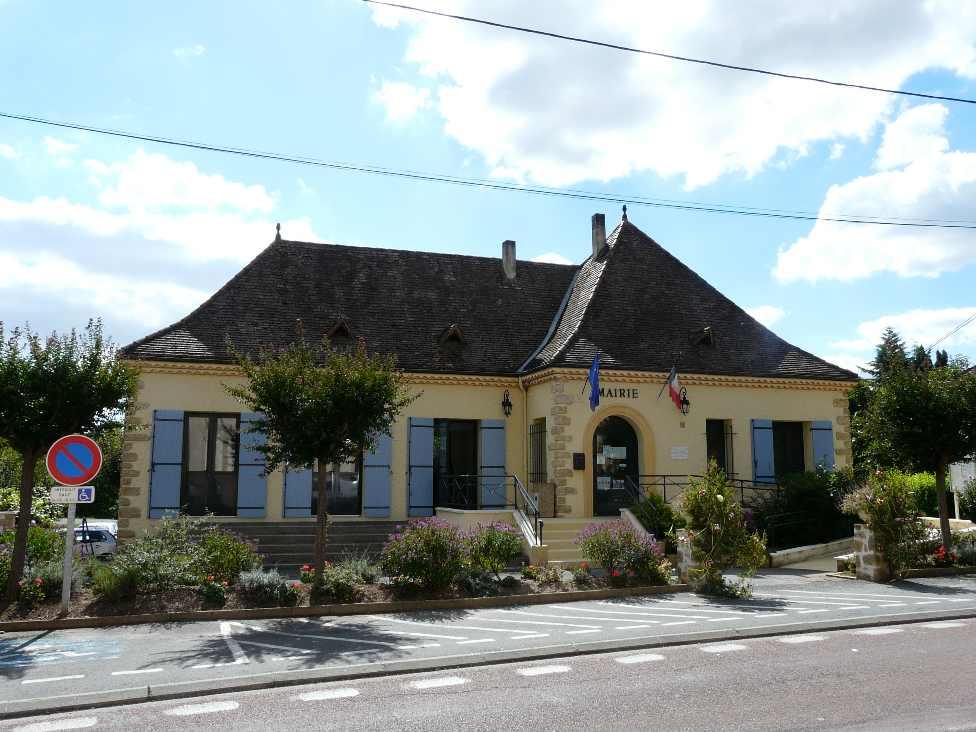 La mairie de Saint-Capraise-de-Lalinde, Dordogne, France.